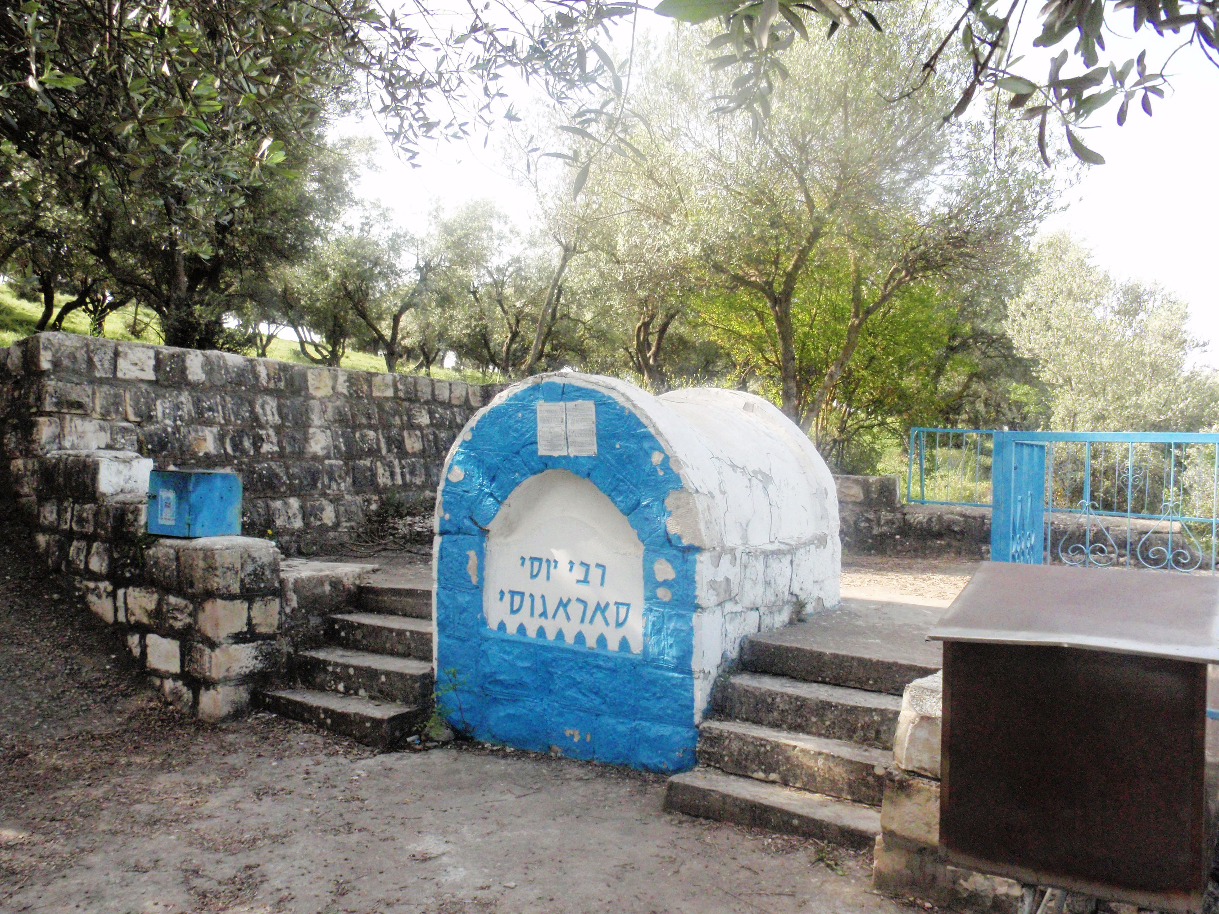 קבר רבי יוסי סרגוסי2